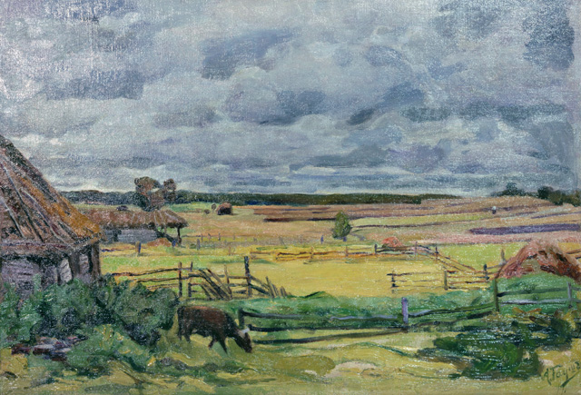 Гауш А.Ф. "Дождливый день", 1900-е, холст, масло, 56х81. Работа находится в собрании Плесского музея-заповедника.